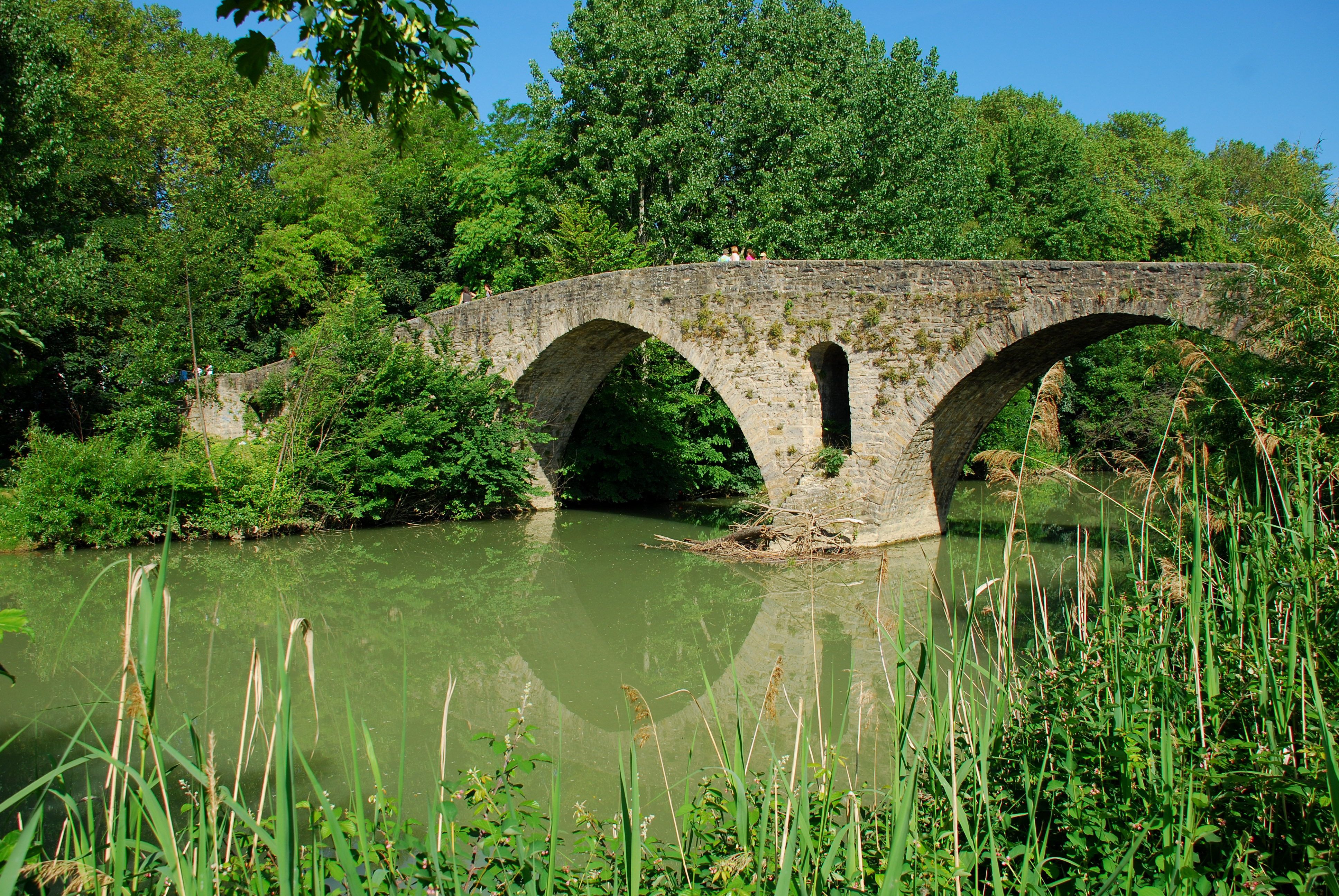 Puente medieval de la Magdalena sobre el río Arga, Pamplona.